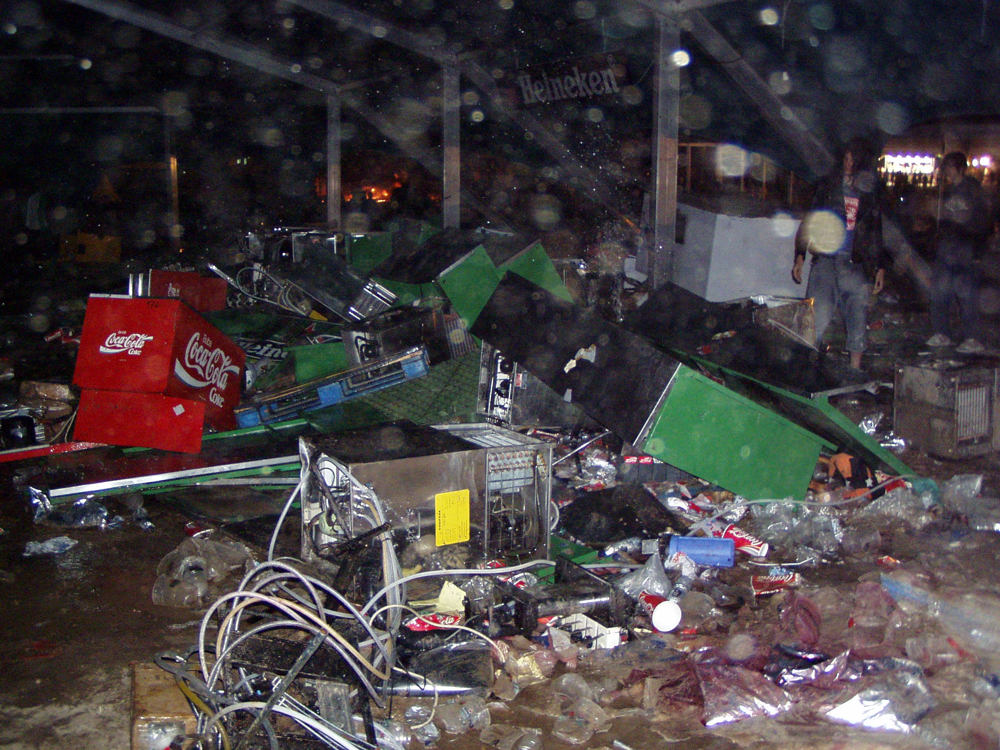 Destrozos en el parque La Cantueña durante Festimad 2005.